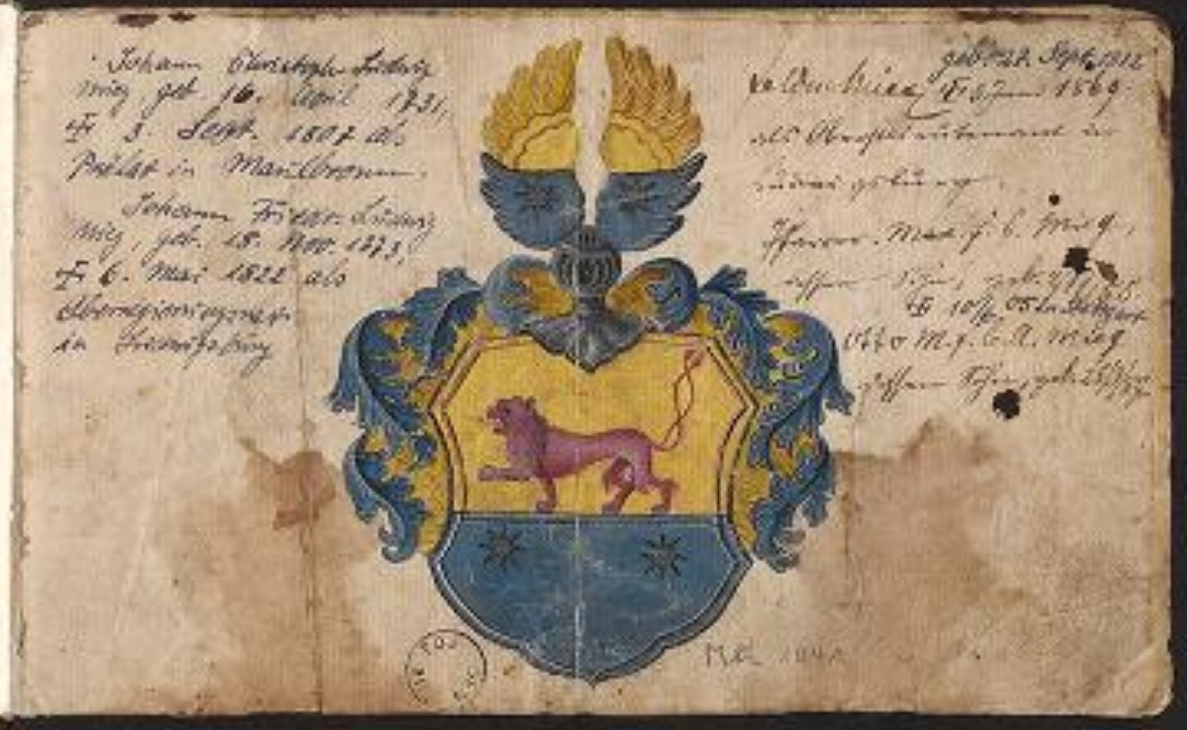 Stammbuch Johann Christoph Ludwig Mieg (p. 27)